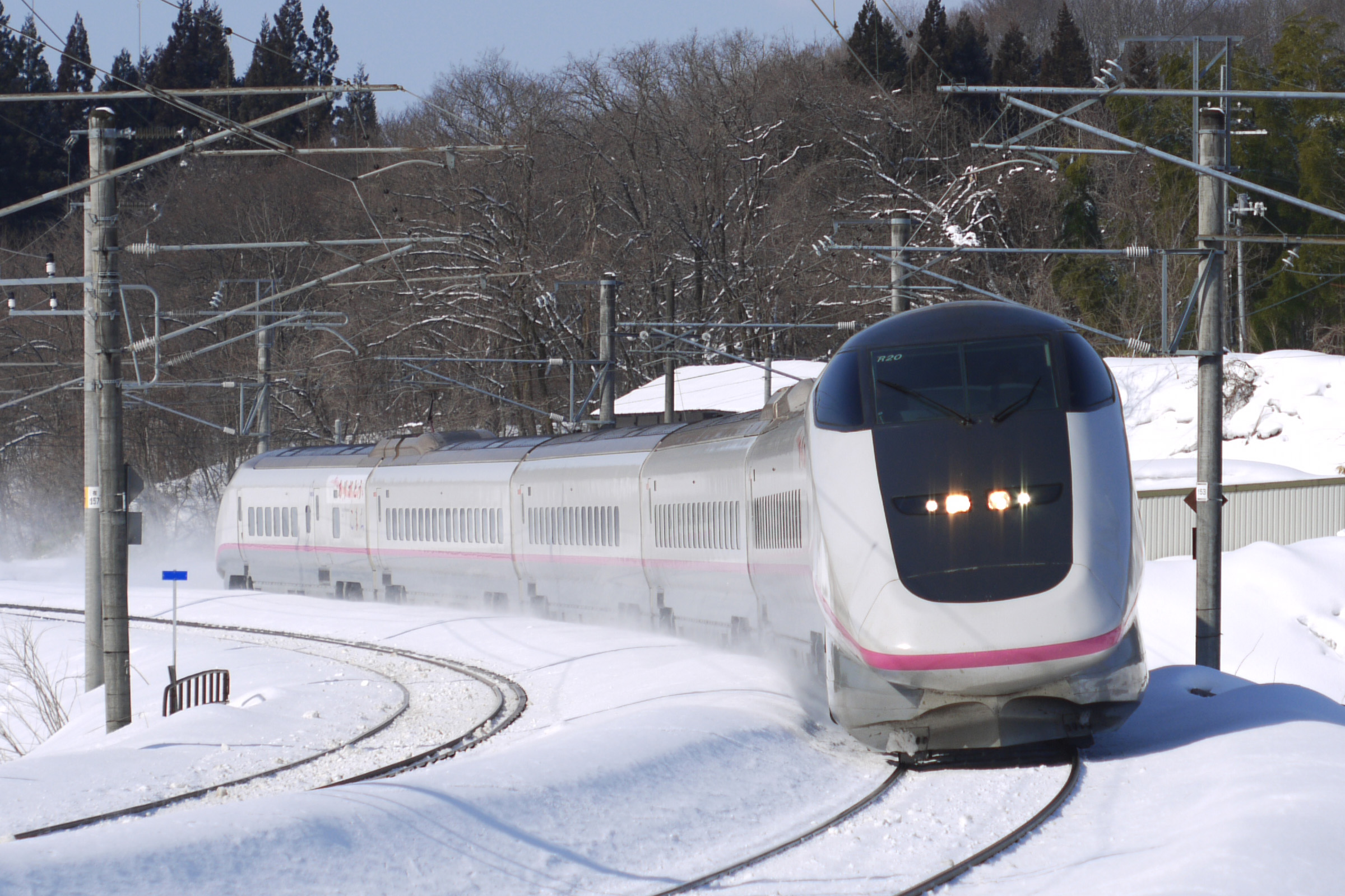 奥羽本線 大曲駅～秋田駅間 標準軌を走行するE3系こまち